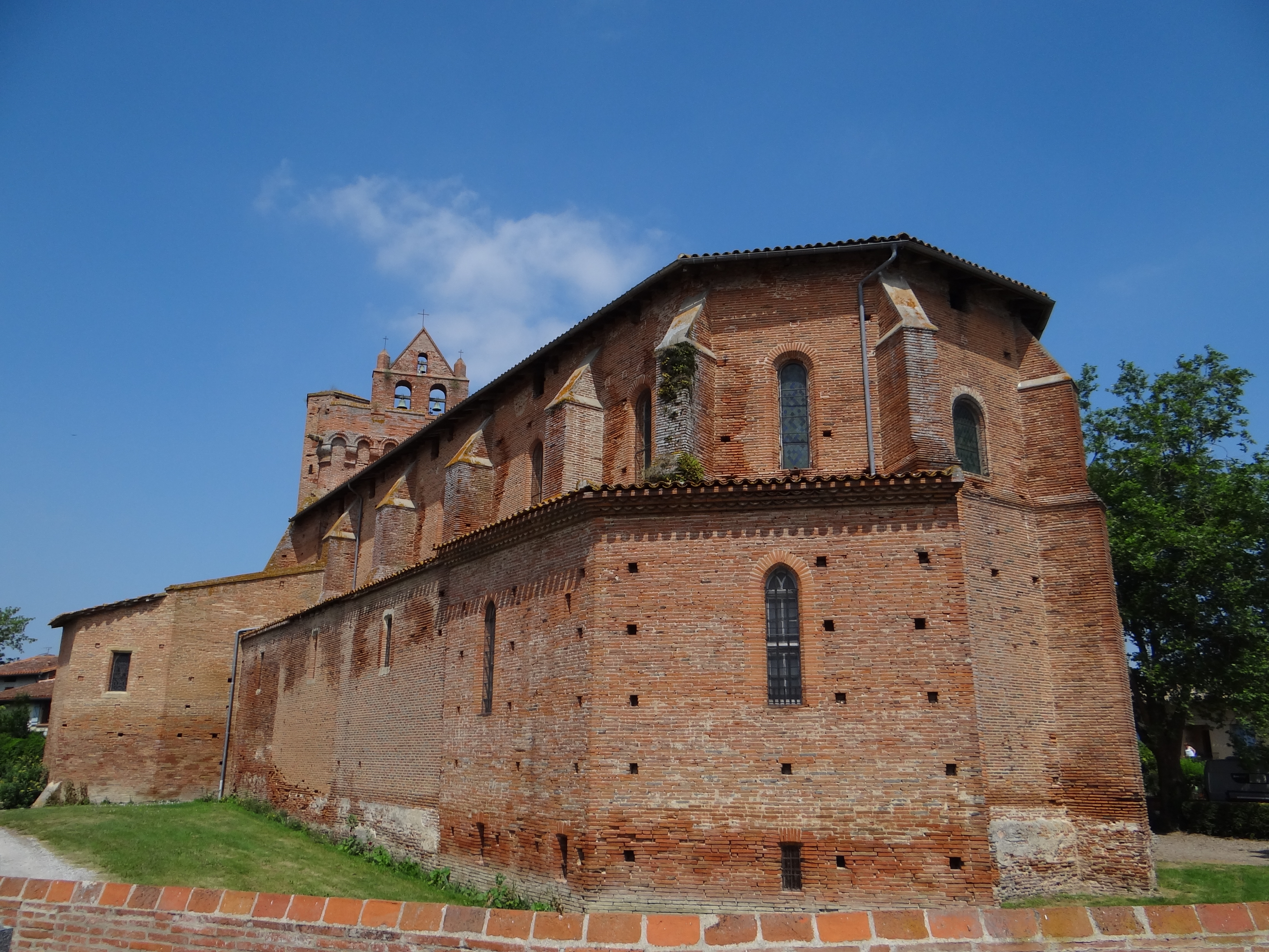 Chevet et flanc sud de l'église, vus depuis le cimetière